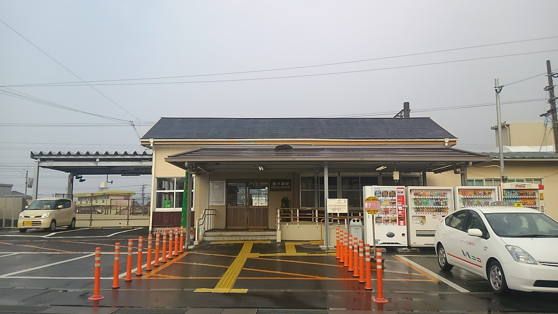 2015年12月31日に撮影